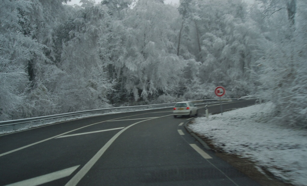 Col de Saverne en hiver, le 16/2/2004 à 13h21